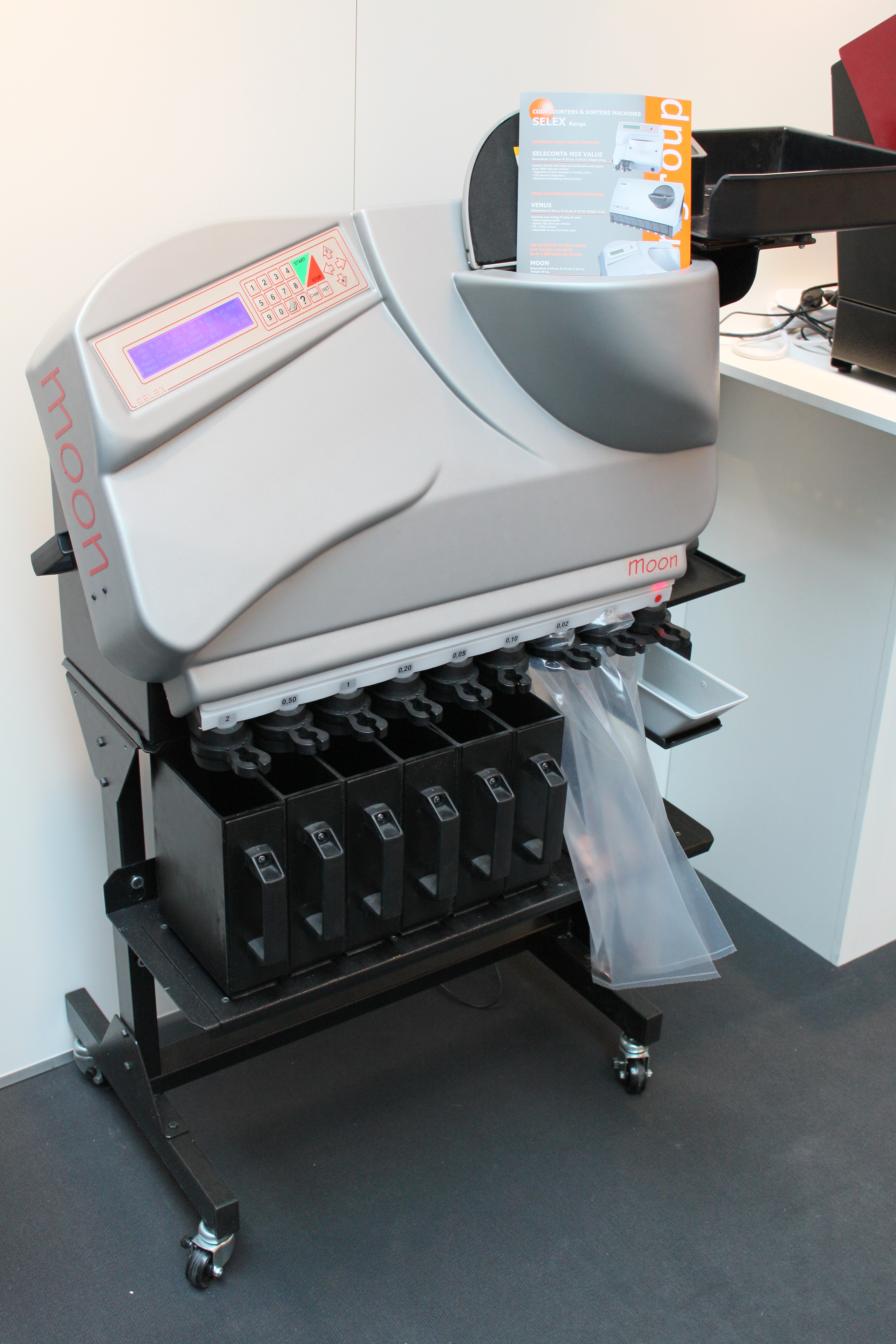 CeBIT 2011;Münzsortiermachine